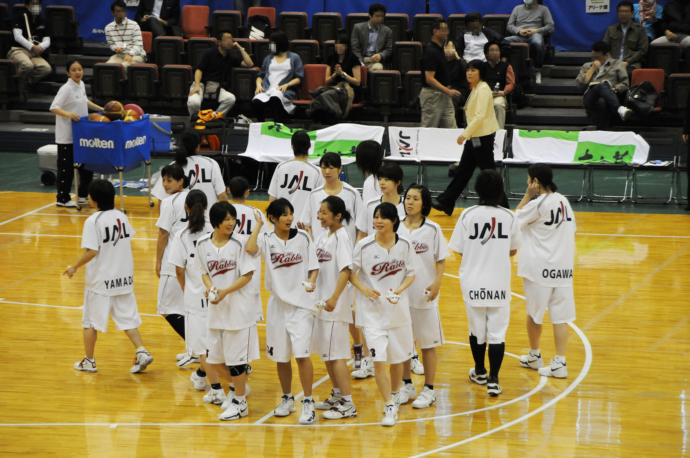 JALラビッツ、船橋アリーナで。